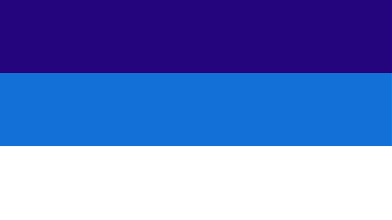 Esta imagen contiene una idea básica de la bandera que representa al cantón de Pérez Zeledón de la provincia de San José de Costa Rica.